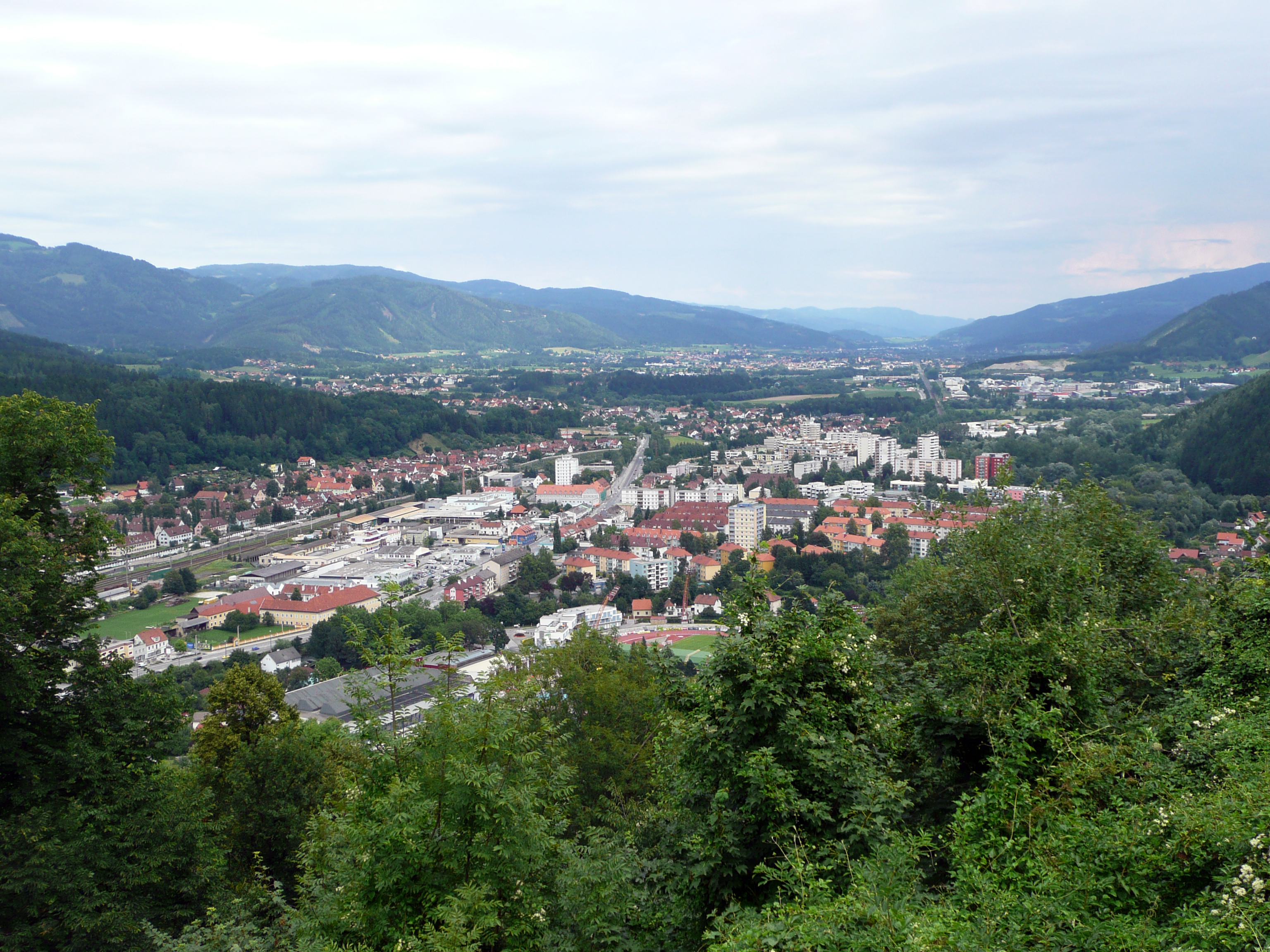 Mürztal bei Kapfenberg Blickrichtung Osten (Flussaufwärts)